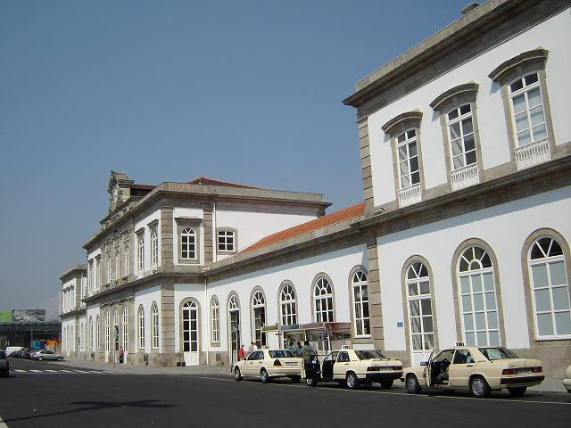 Exterior da Estação.